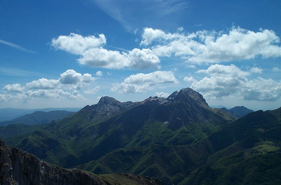 gruppo delle Panie ripreso da Nord-Ovest